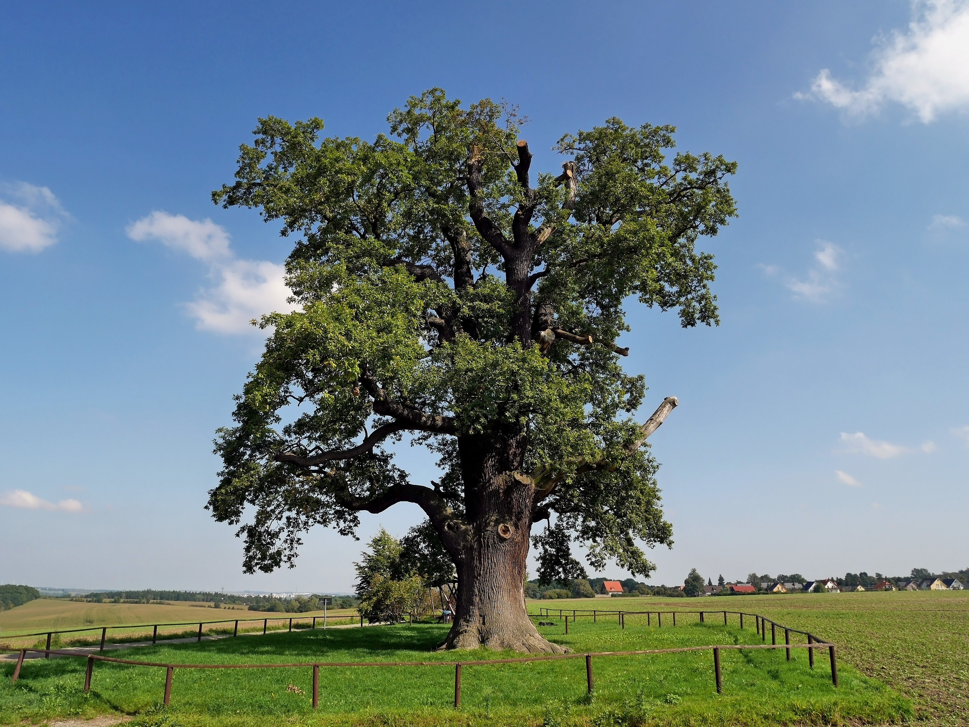 Die Kalte Eiche steht frei auf einer Hochfläche bei Ernsee, einem Stadtteil von Gera. Der Name leitet sich vom Standort ab, auf einem windigen, kalten Höhenrücken. Das Alter der Eiche wird auf etwa 400 Jahre geschätzt, der Umfang in Brusthöhe beträgt 7 m. Es handelt sich um eine Stieleiche, die als Naturdenkmal eingetragen ist.